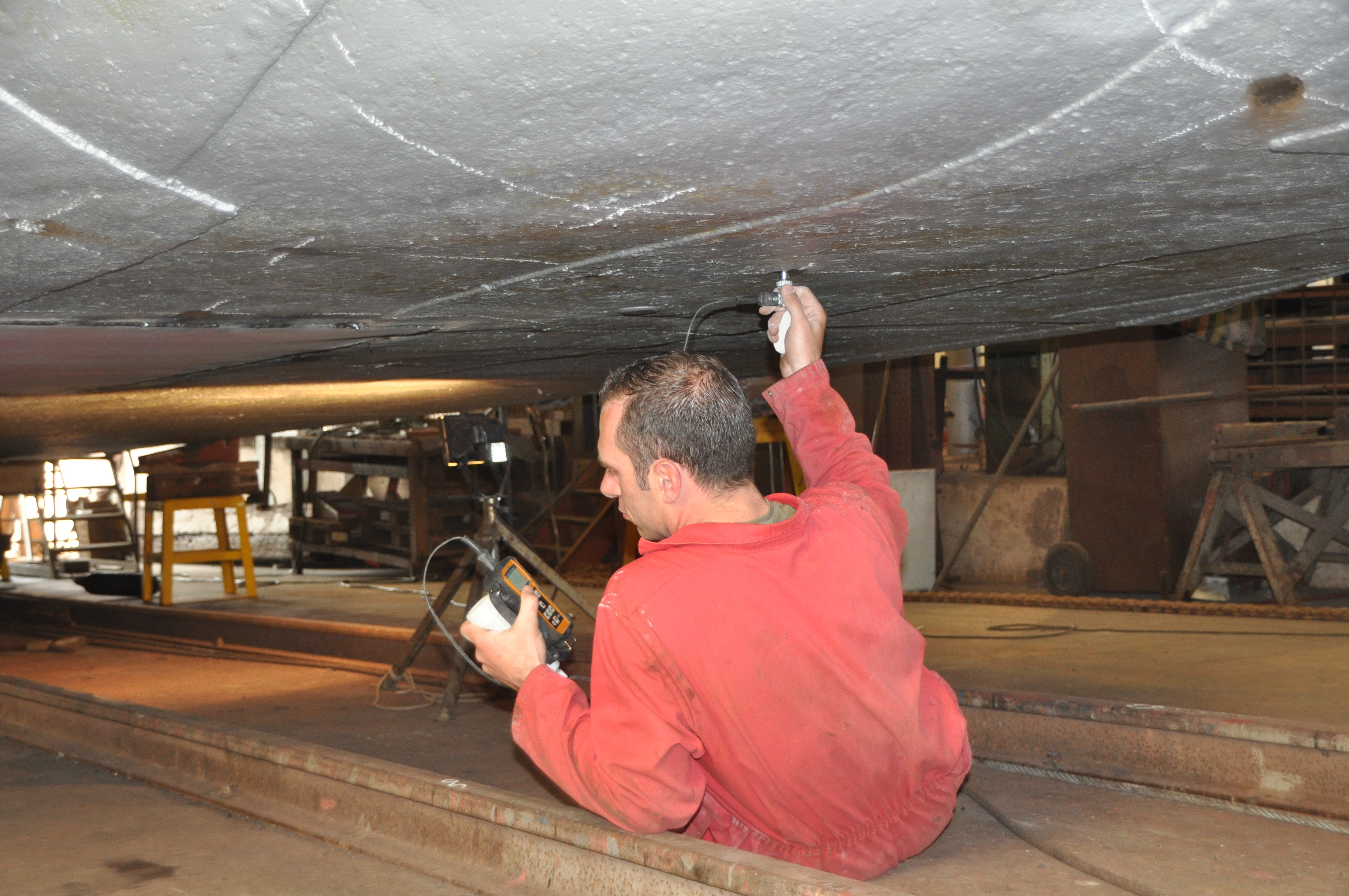 Vlakmeting Stella Maris.